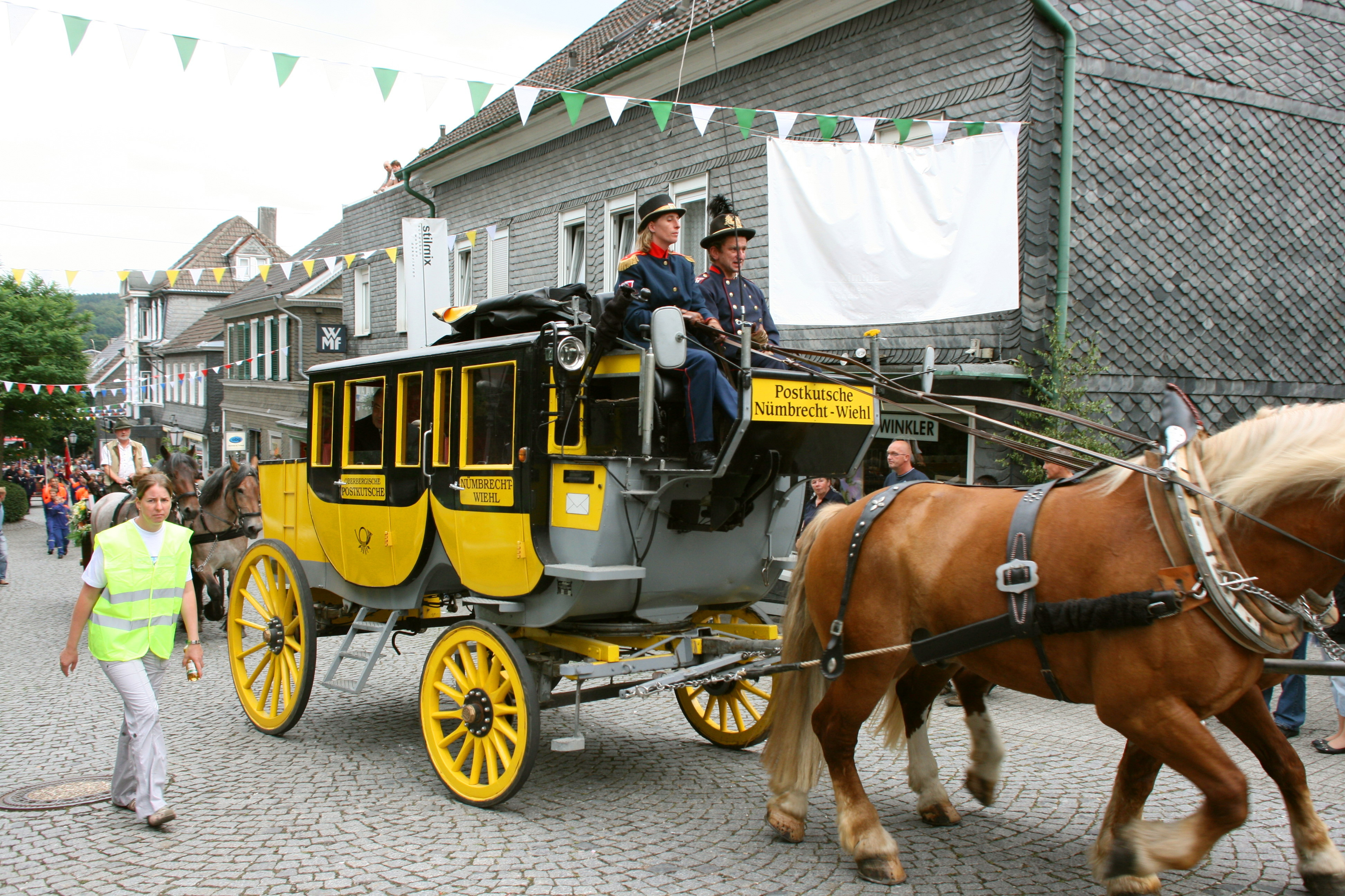 Festumzug zur Feier „925 Jahre Hückeswagen“ am 25. Jul. 2010 in Hückeswagen